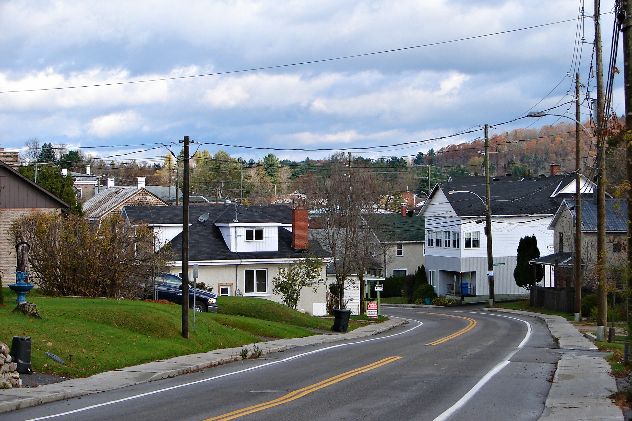 Saint-André-Avellin, Quebec, Canada